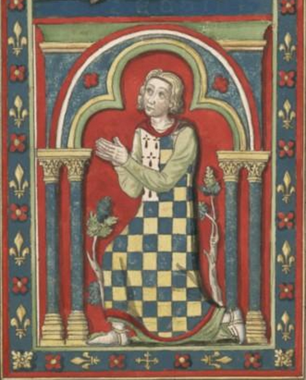 Vitrail de N.-D. de Chartres, sur lequel est représenté un prince en costume civil, portant une cotte échiquetée d'azur et d'or au franc quartier d'hermines